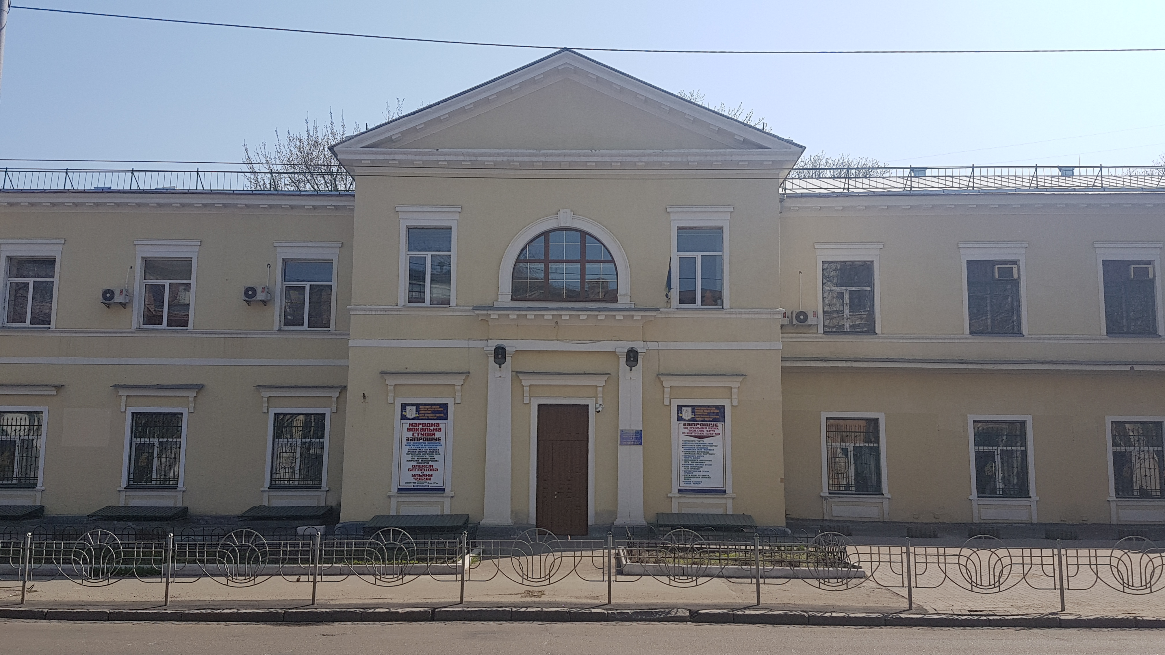 Центр художественного и технического творчества «Печерск». Фасад